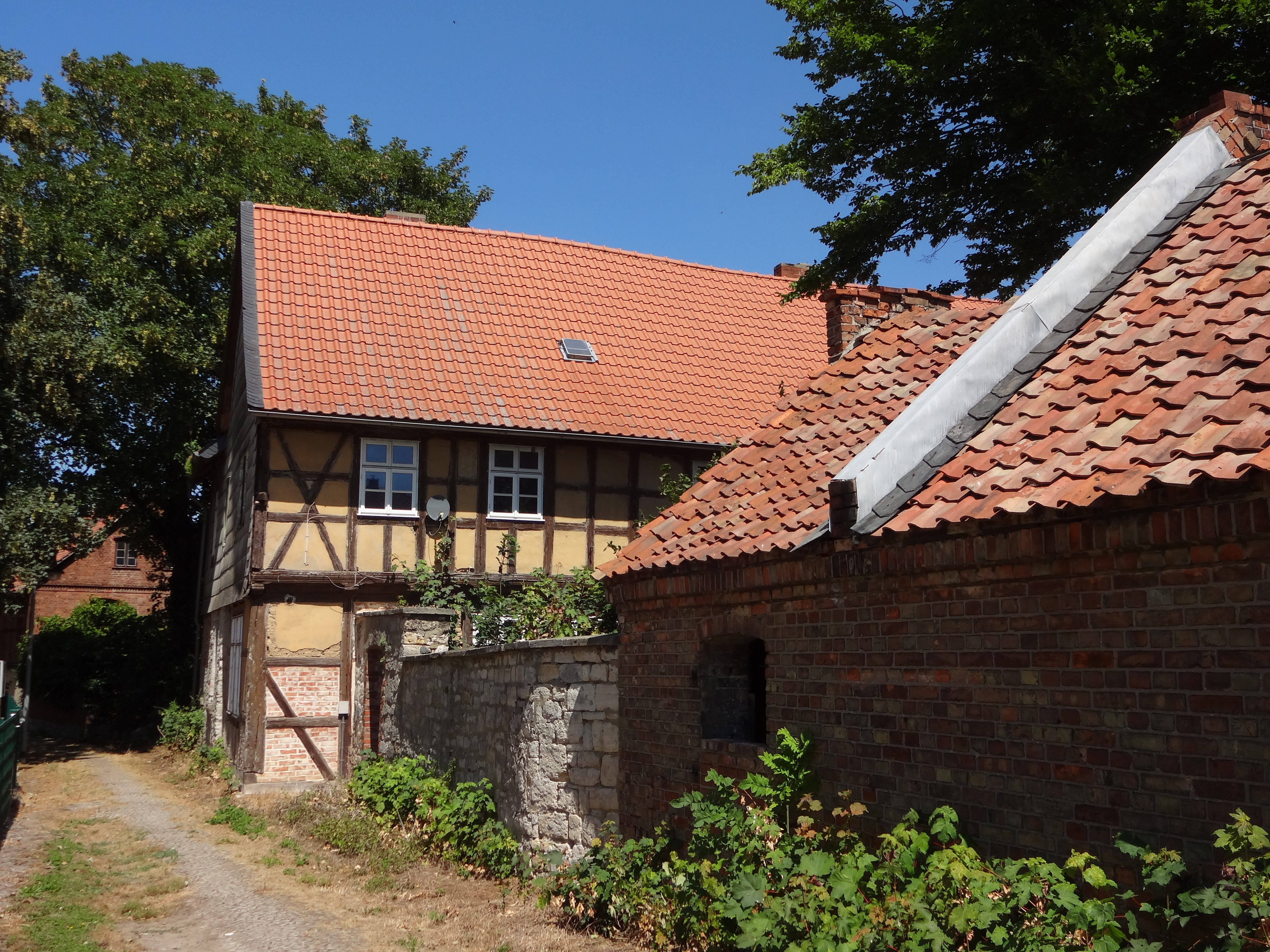 denkmalgeschütztes Pfarrwitwenhaus in der Hüttenstraße 3 in Dedeleben